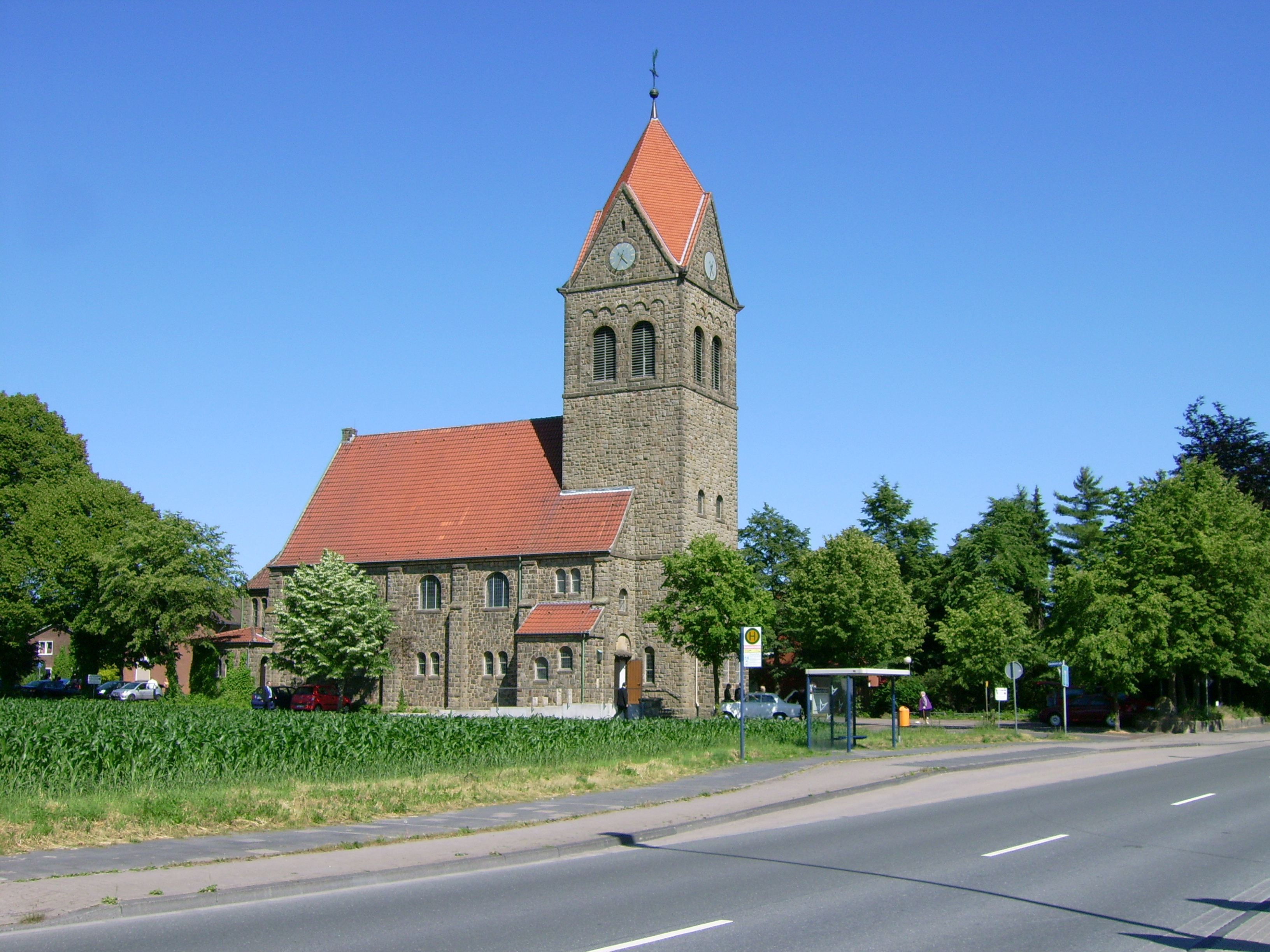 Ev. Kirche Lengerich-Hohne This is a photograph of an architectural monument.